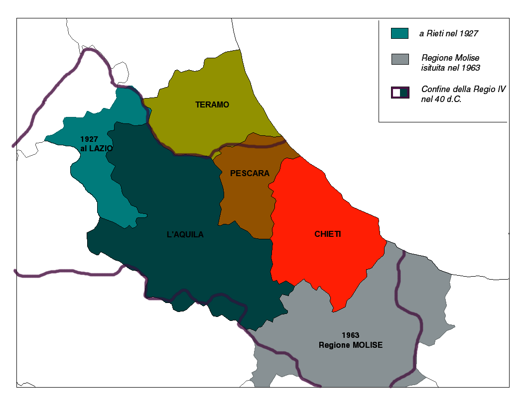 Ho creato questa immagine modificando un file già presente su wikipedia (Abruzzo_provinces.png). Non dovrebbero esserci problemi